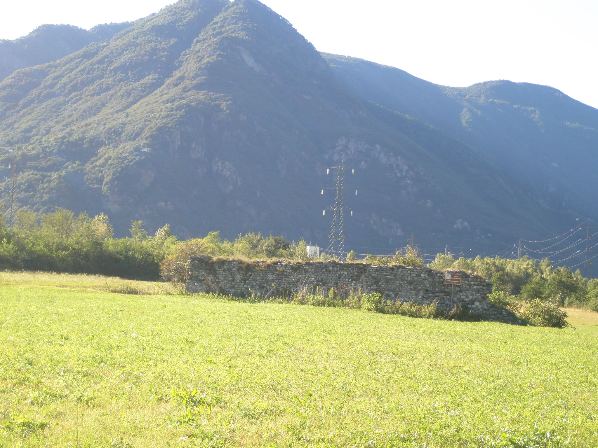 Muro del Borgaccio nei pressi del fiume Toce, che separa Pieve Vergonte e il vicino paese Vogogna. Sono i resti di un muro del castello di Pietrasanta, distrutto il 9 febbraio 1348, detto comunemente il Borgaccio.